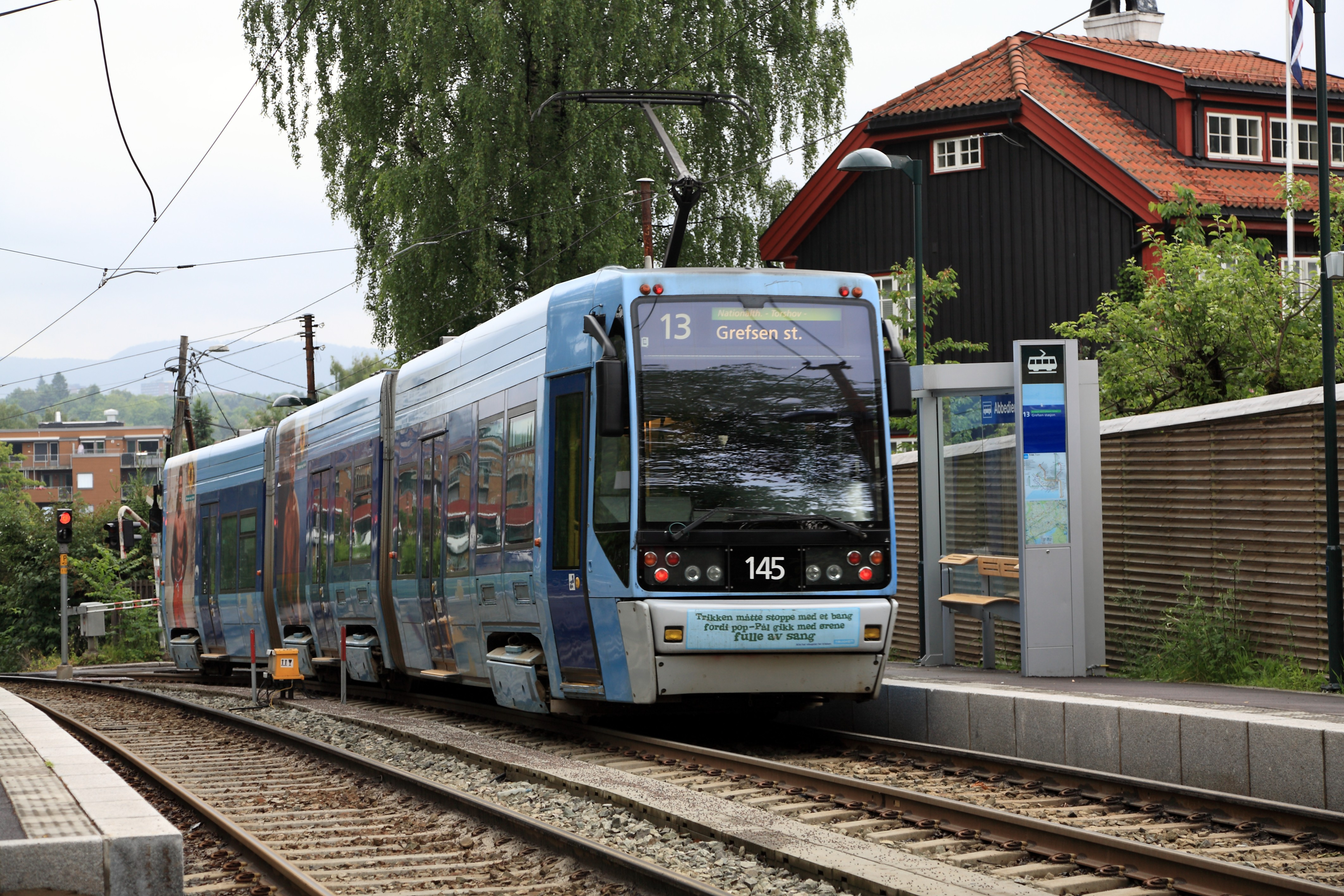 Gelenktriebwagen der Reihe SL95 auf der Lillekerbanen stadteinwärts nach Grefsen stasjon, Nachschuss.